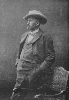 Václav Březina (1862 - 1906), Český malíř.